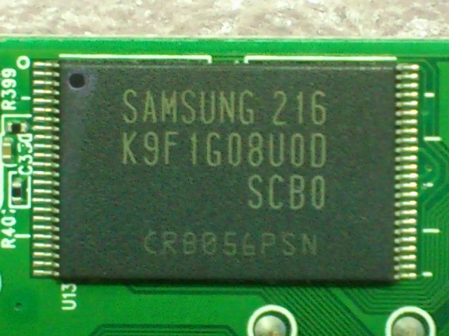 中文（台灣）: 三星電子的記憶體顆粒K9F1G08U0D-SCB0